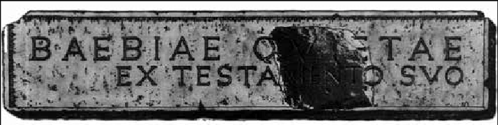 Inscripció funerària romana al sepulcre de Baebia Quitae, Daimús.